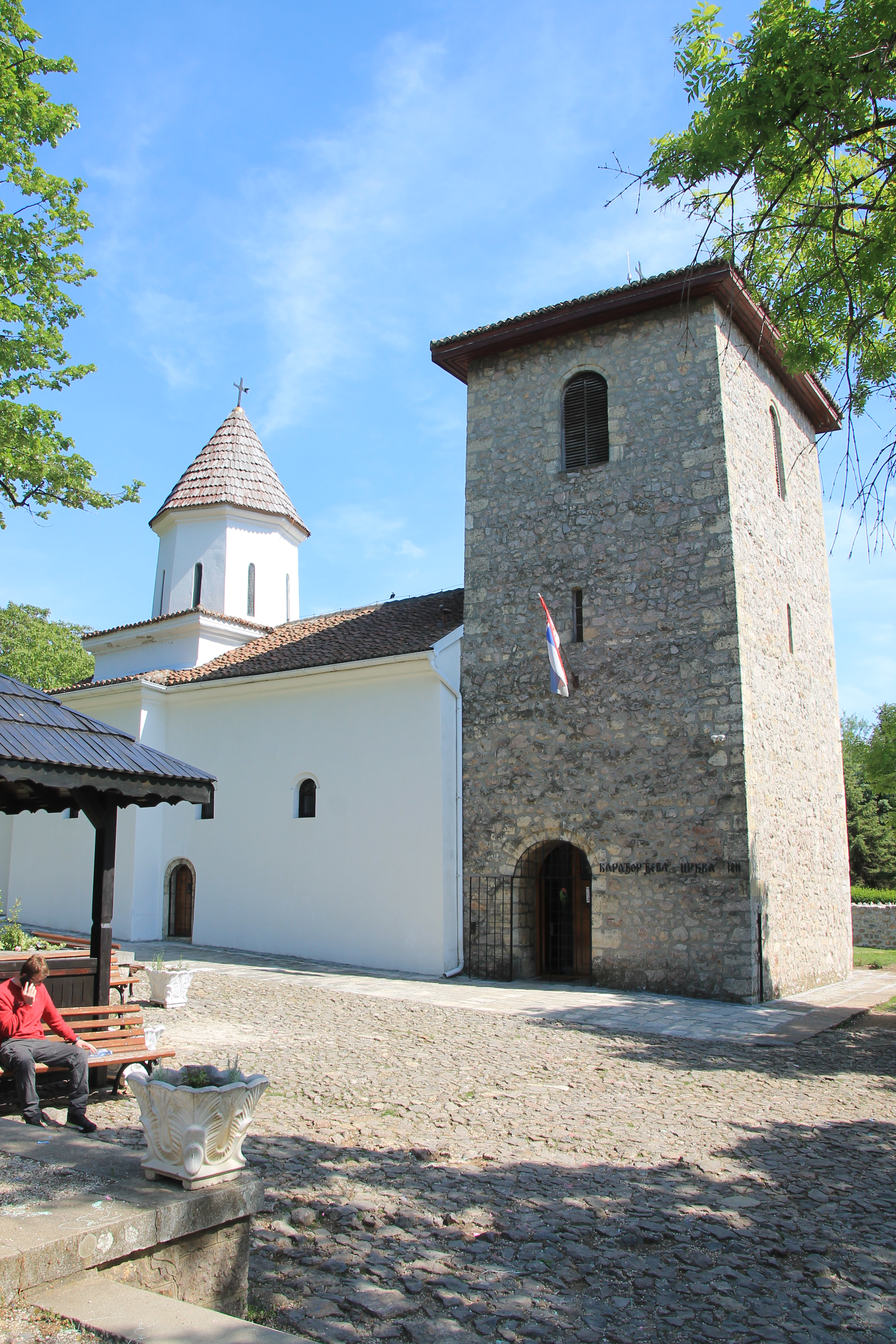 Karadjordjeva crkva (Topola)